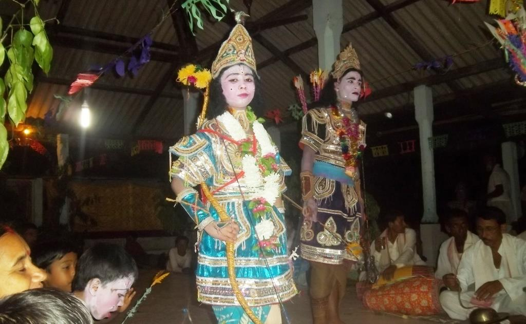 অসমীয়া: ভাওনাত দুজন ভাৱৰীয়া আৰু নামঘৰৰ দৰ্শক ৰাইজ